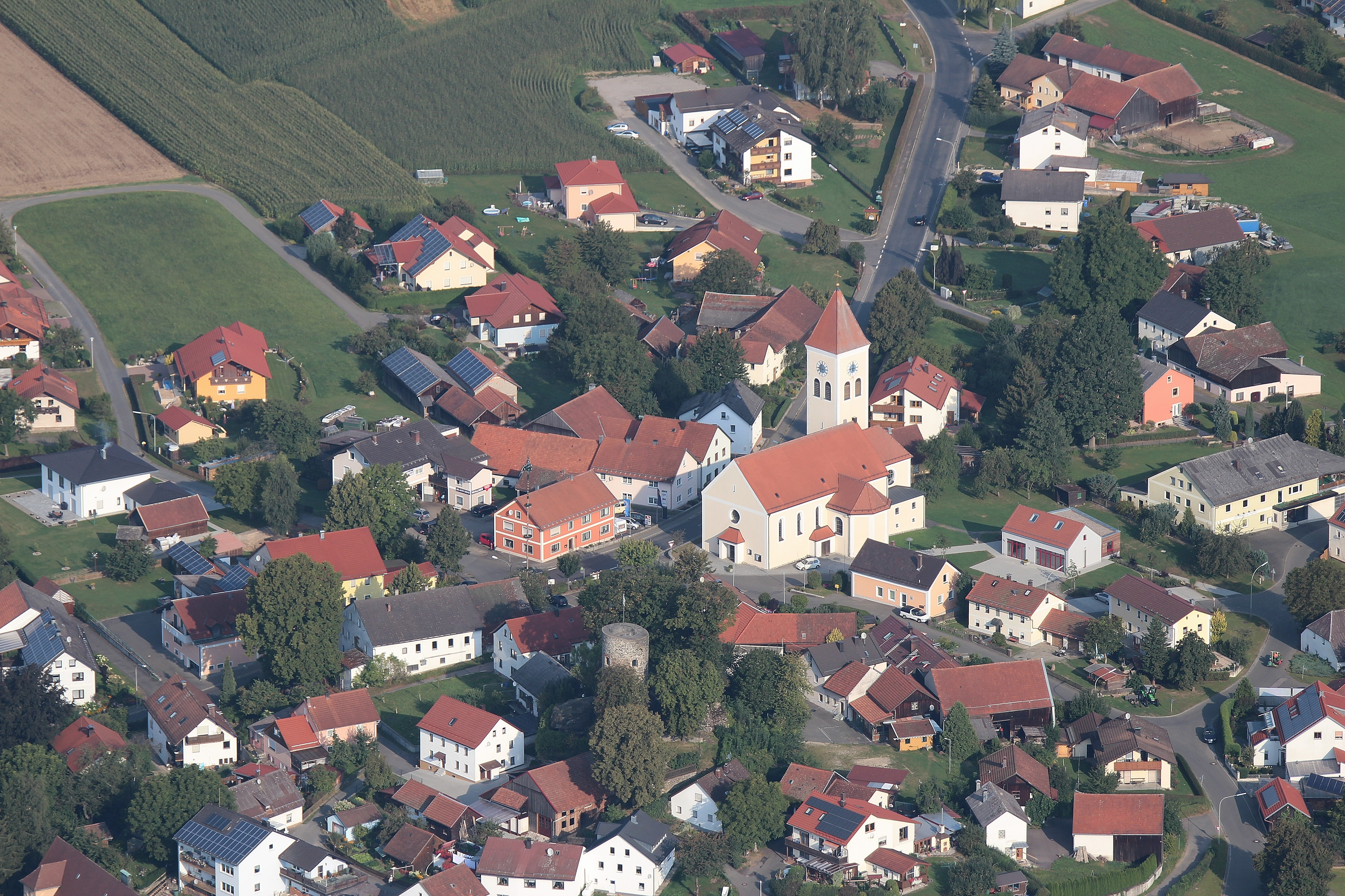 Treffelstein, Kirche Erscheinung des Herren; Landkreis Cham, Oberpfalz, Bayern